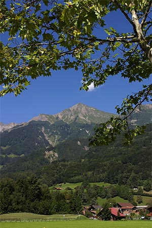 Freilichtmuseum Ballenberg